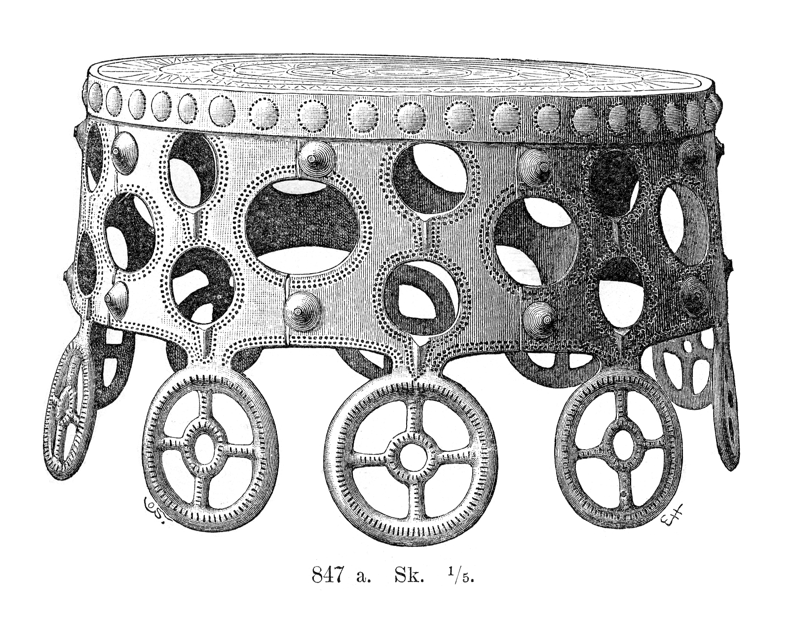 Balkåkragongen är ett kultföremål i brons och det hittades 1847 i en torvmosse vid Balkåkra by, Balkåkra socken, Ljunits härad, Ystads kommun, Skåne, Sverige. Kultföremålet brukar tolkas som en trumma av brons, vilket instrumentaltekniskt innebär att den är en gong. Föremålet dateras till bronsålderns Period II (1500-1300 f.Kr.). Ett likadant föremål hittades år 1914 i Hasfalva i dåvarande Ungern (senare Haschendorf i Österrike). Balkåkragongen inköptes 1848 till Statens Historiska Museum i Stockholm och har där inventarienummer SHM 1461.